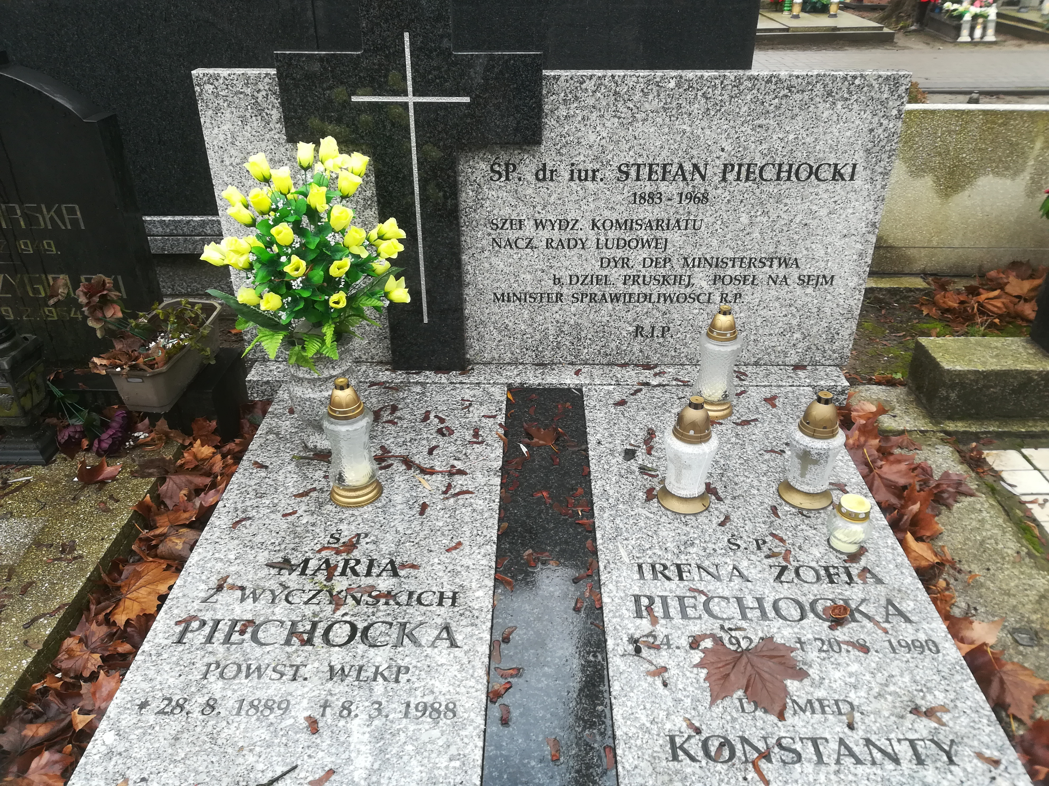 Grób Stefana Piechockiego na cm. górczyńskim w Poznaniu.